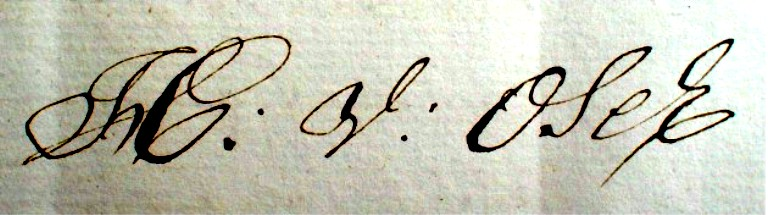 Handtekening van Hendrik van Osch, 1766 - 1843